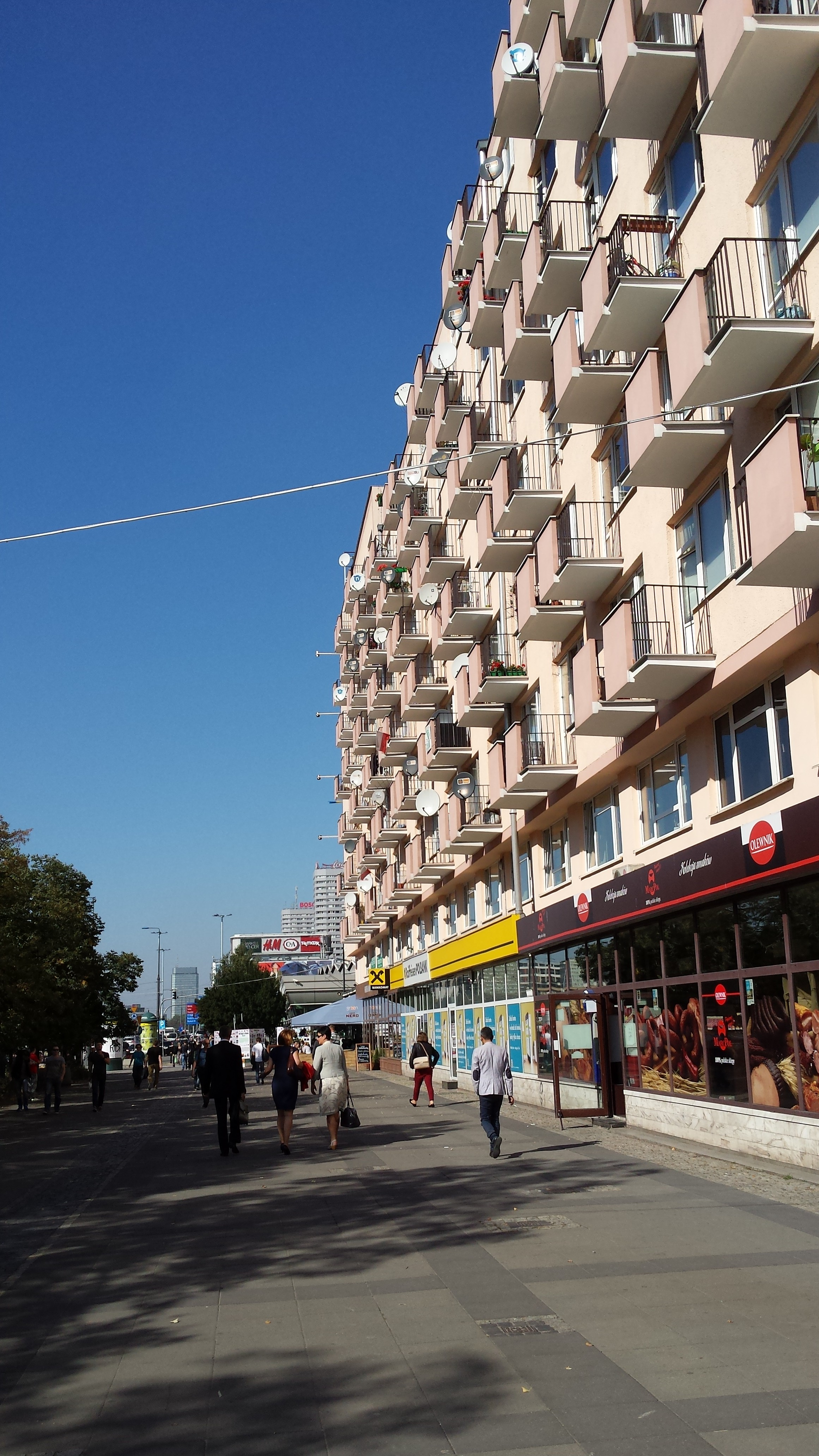 Blok, w którym do końca życia mieszkała Danuta R. Urbanowicz.